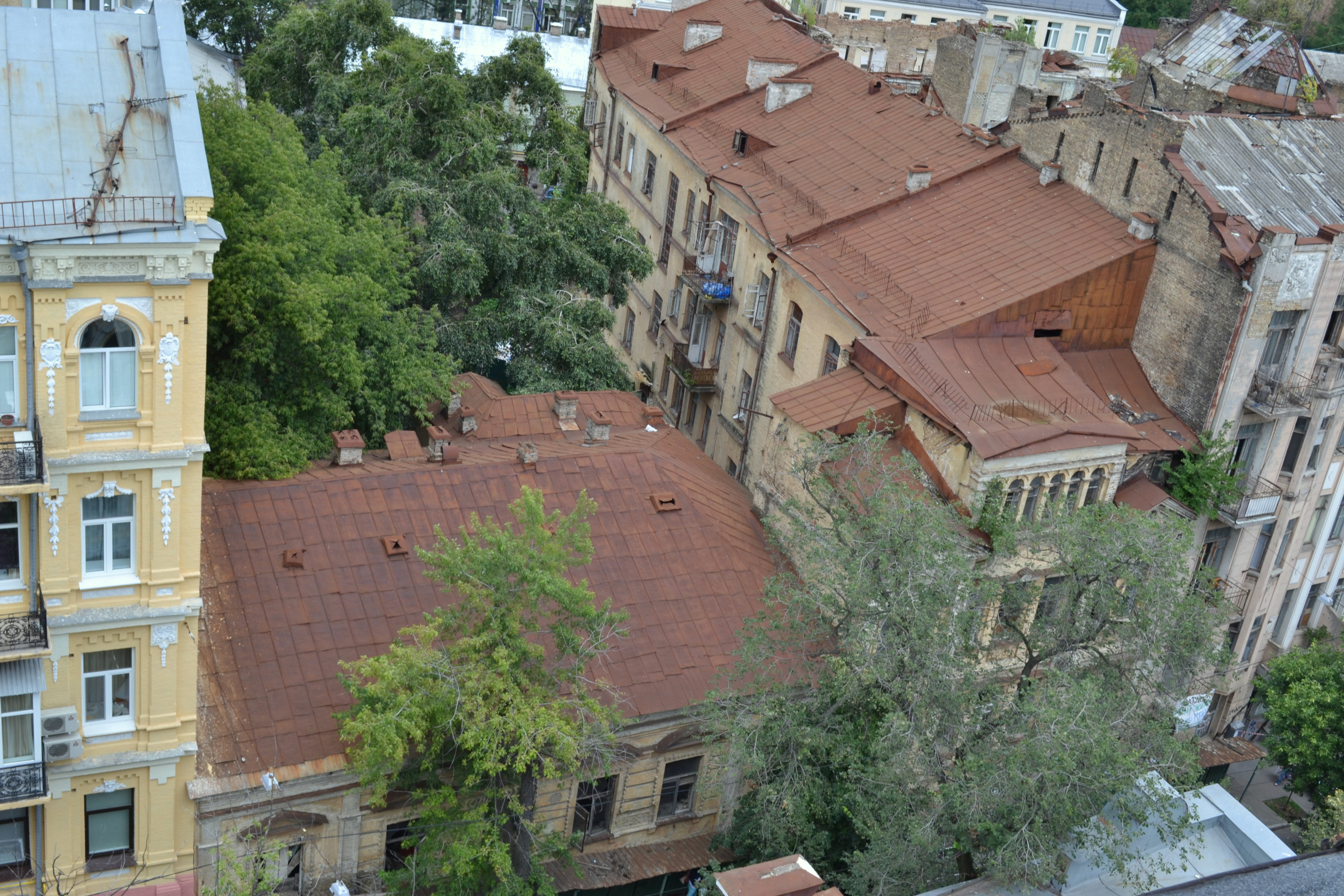 Садиба Мурашка в Києві